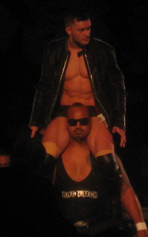 2013年11月9日 大阪府立体育会館 「POWER STRUGGLE」 プリンス・デヴィット（上） & バッドラック・ファレ（下）